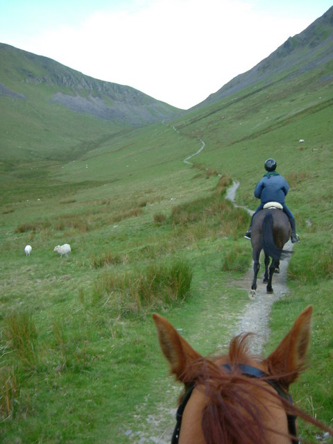 Bwlch Maesgwyn on Horseback